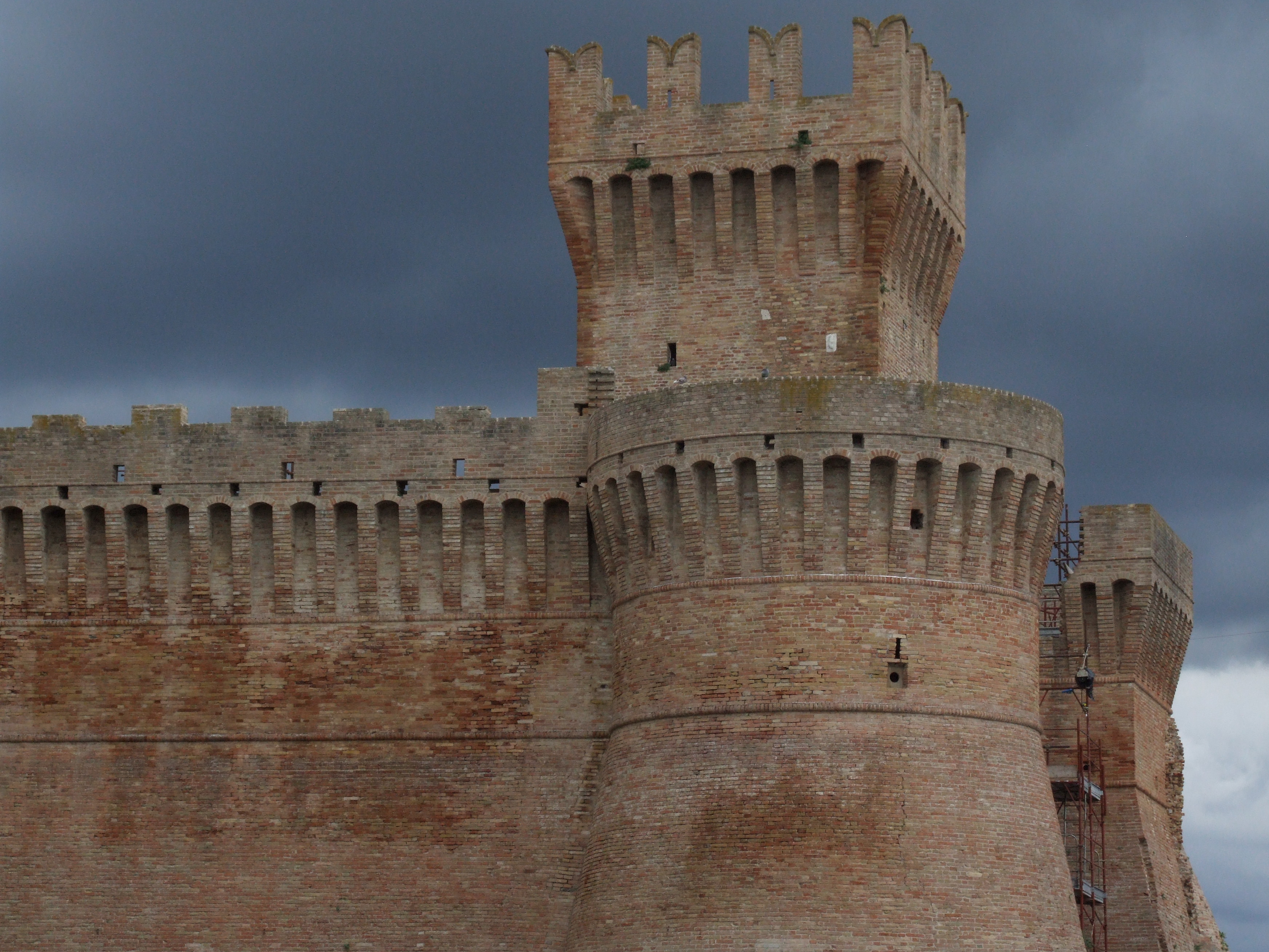 Rocca Medioevale This is a photo of a monument which is part of cultural heritage of Italy.